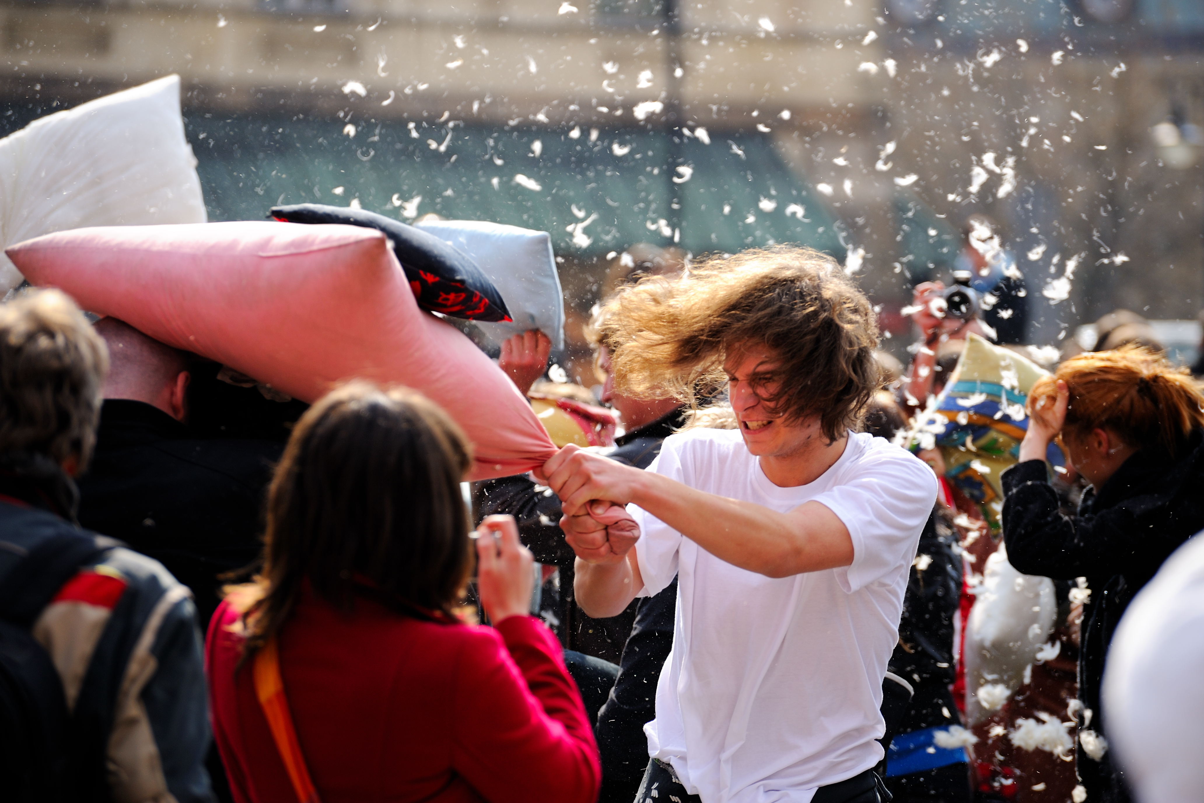 Warszawskie Spacery Fotograficzne Spacer 118 (Bitwa na poduszki i świąteczny street)